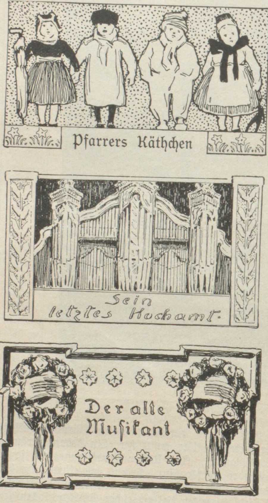 Otto Ubbelohde Illustrationen zu Wilhelm Holzamer Im Dorf